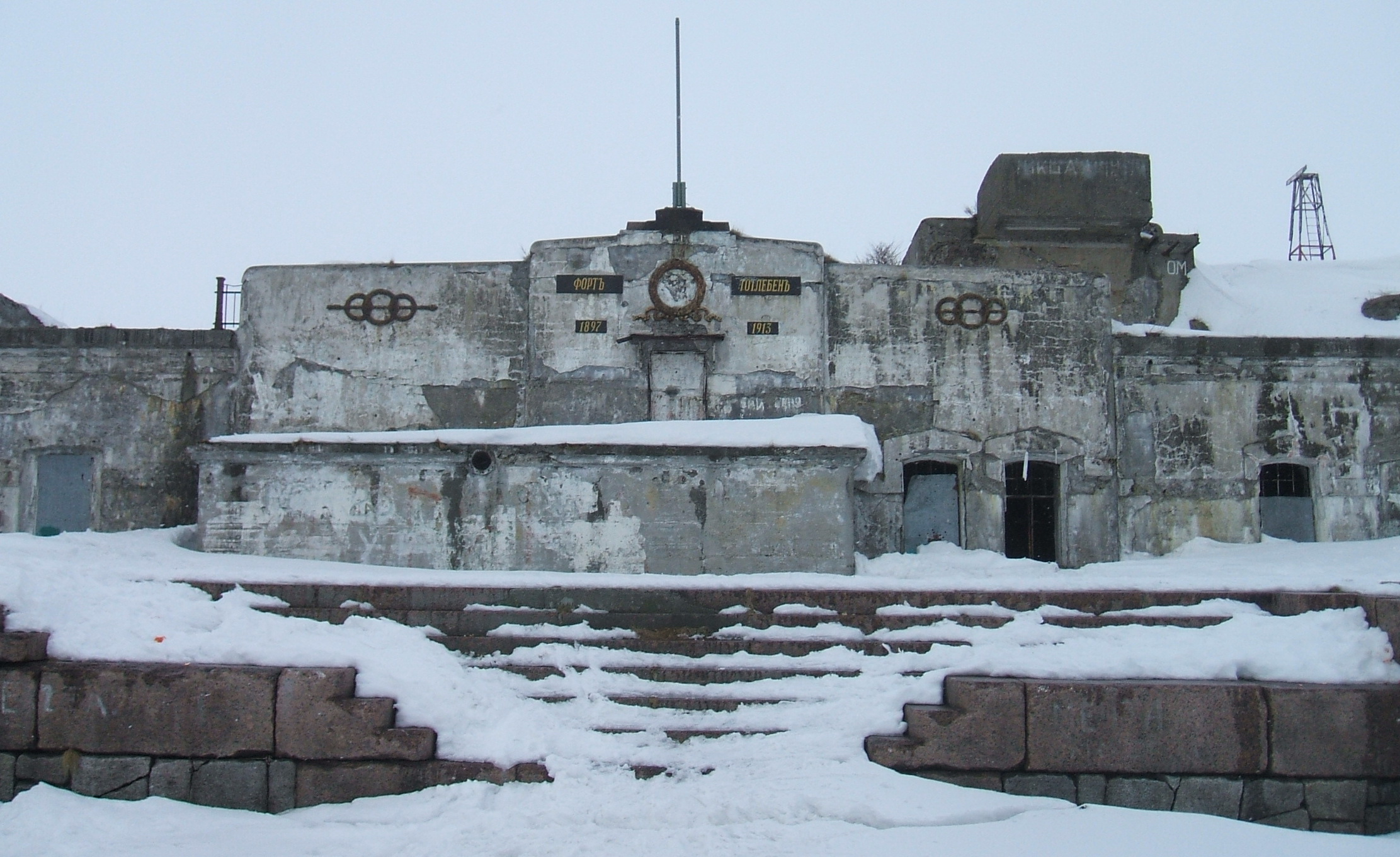 Портик форта Тотлебен СПб